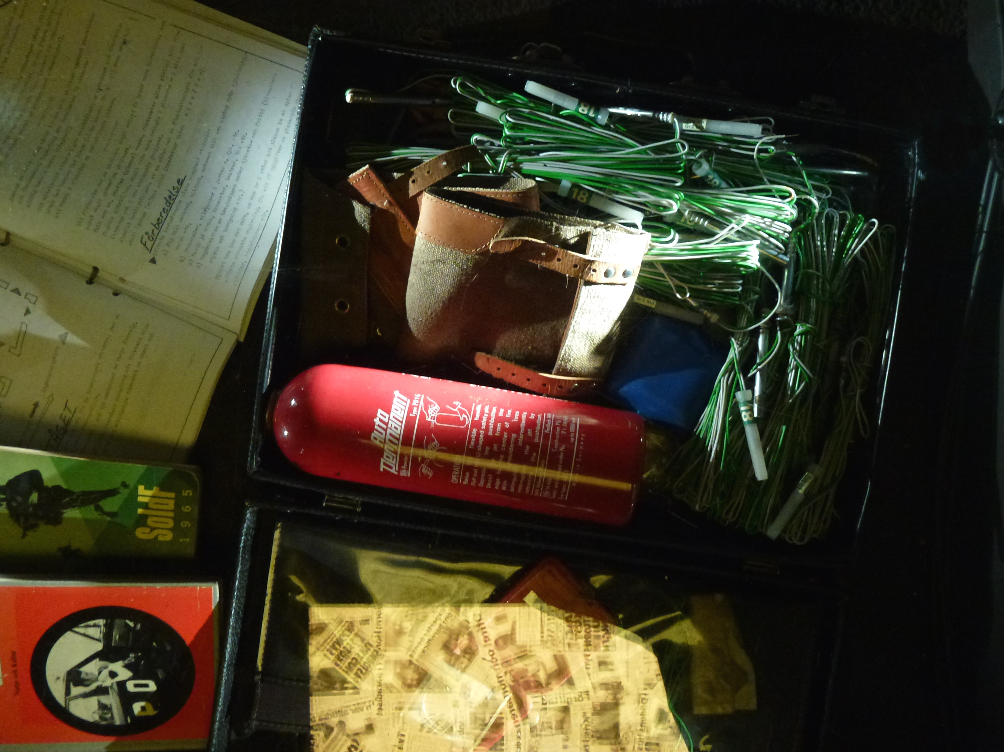 Polismuseet samlingar, Norbert Kröchers sprängmedelväska